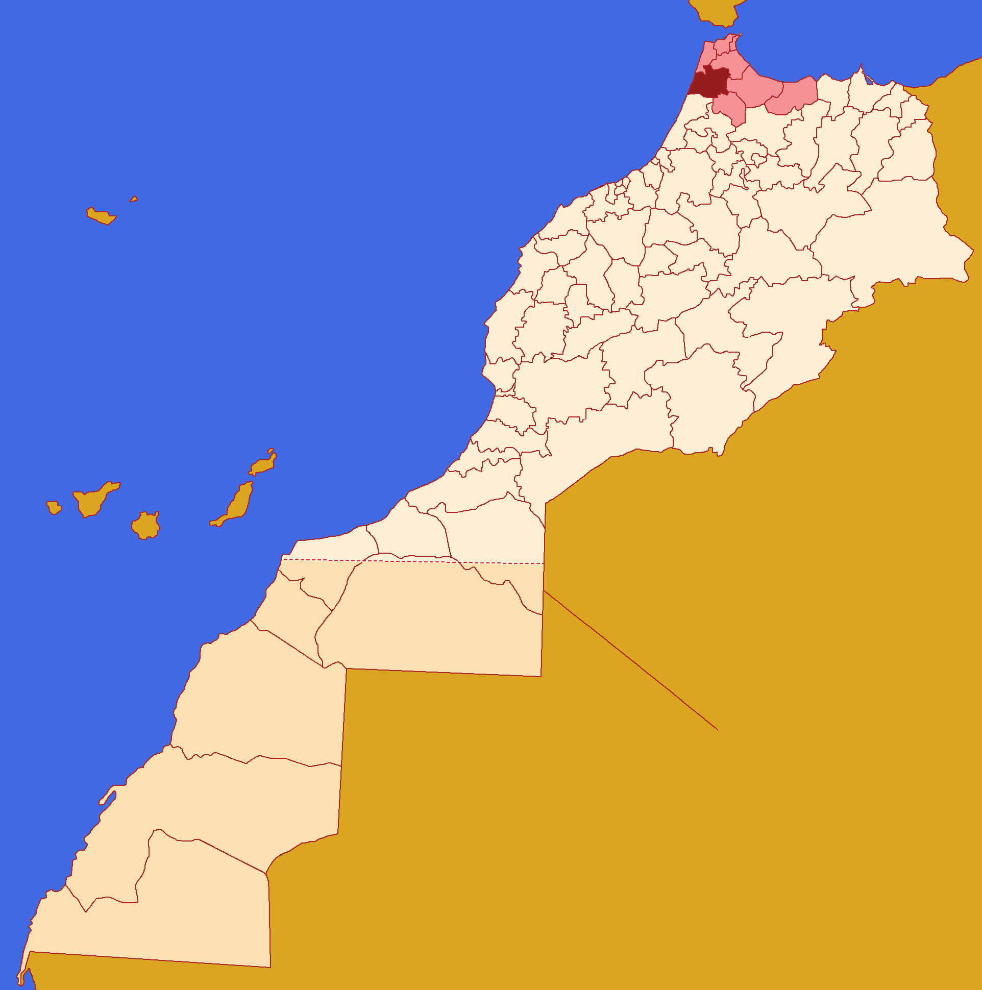 Localização da provincia de Larache,na Região de Tânger-Tetuão-Al Hoceïma, em Marrocos